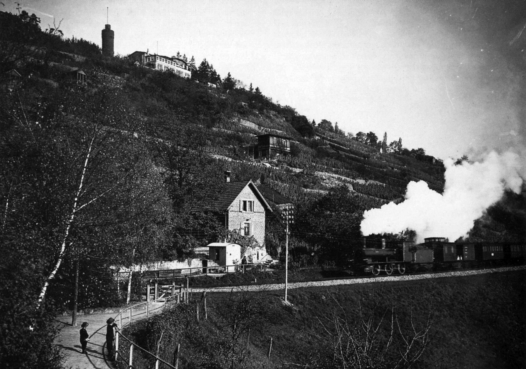 Dampflokomotive Württembergische F in Stuttgart-Heslach.